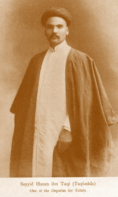 کارت پستال با تصویر تقی زاده چاپ سال 1309 خورشیدی